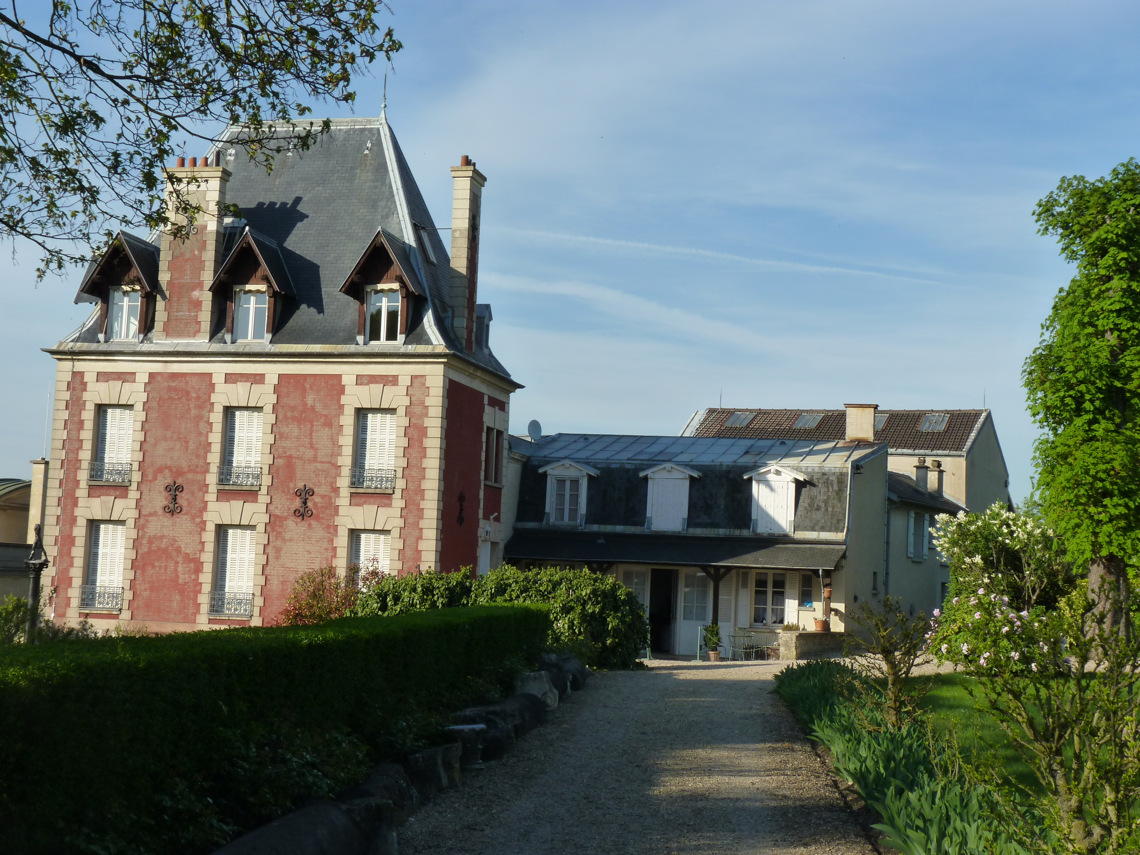 Vue de face de la villa des Brillants, résidence d'Auguste Rodin à Meudon